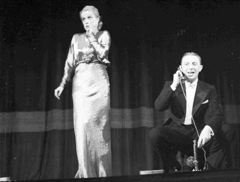 Scala (Berlin): Genia Nikolajewa, Theo Lingen